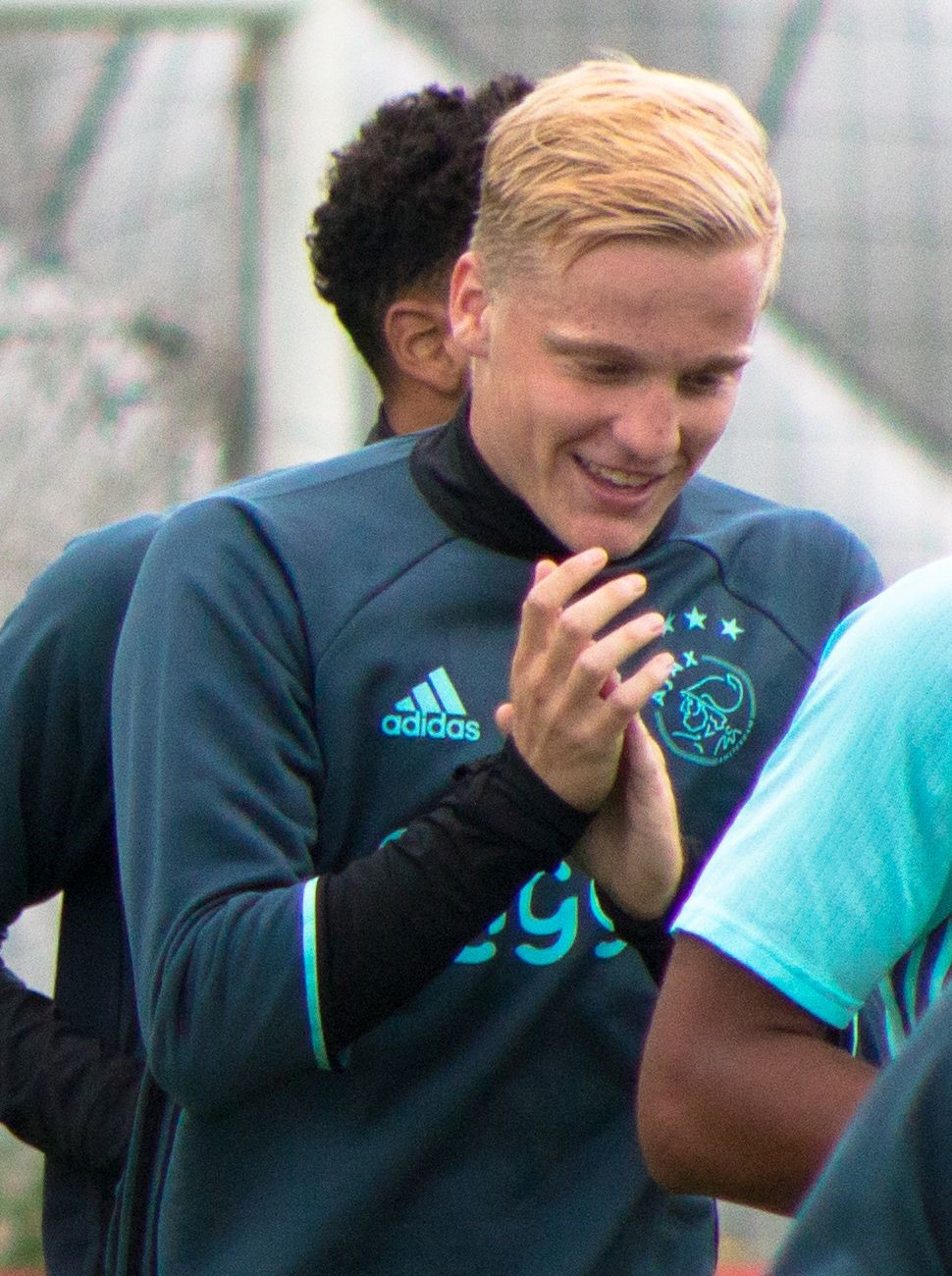 Ajax Open Training